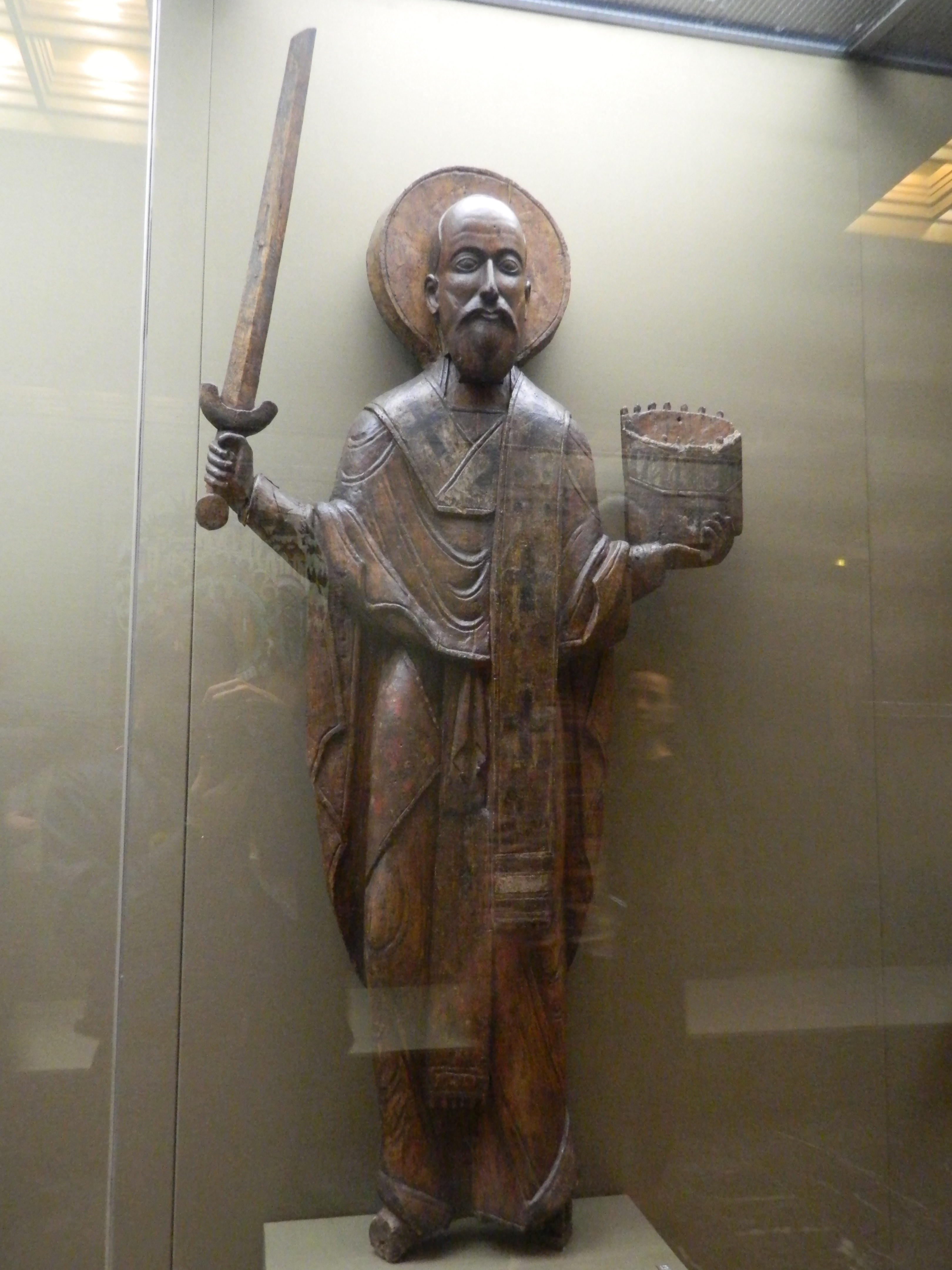 Никола Можайский